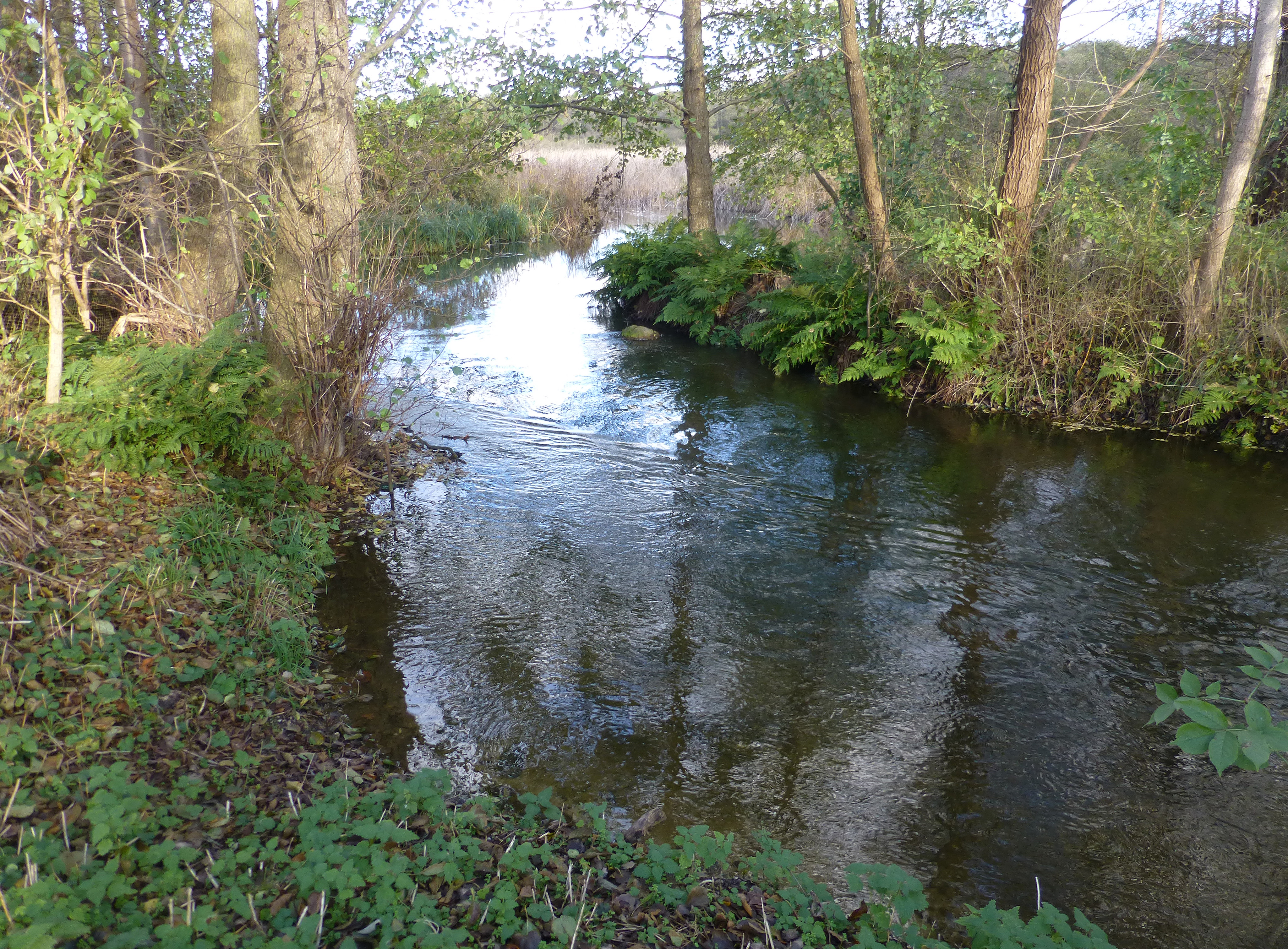 Havmølle Å er en knap 5 km lang å der danner forbindelsen mellem Stubbe Sø og Kattegat i Syddjurs Kommune på Djursland; Set mod vest kort efter udløbet fra Stubbe Sø